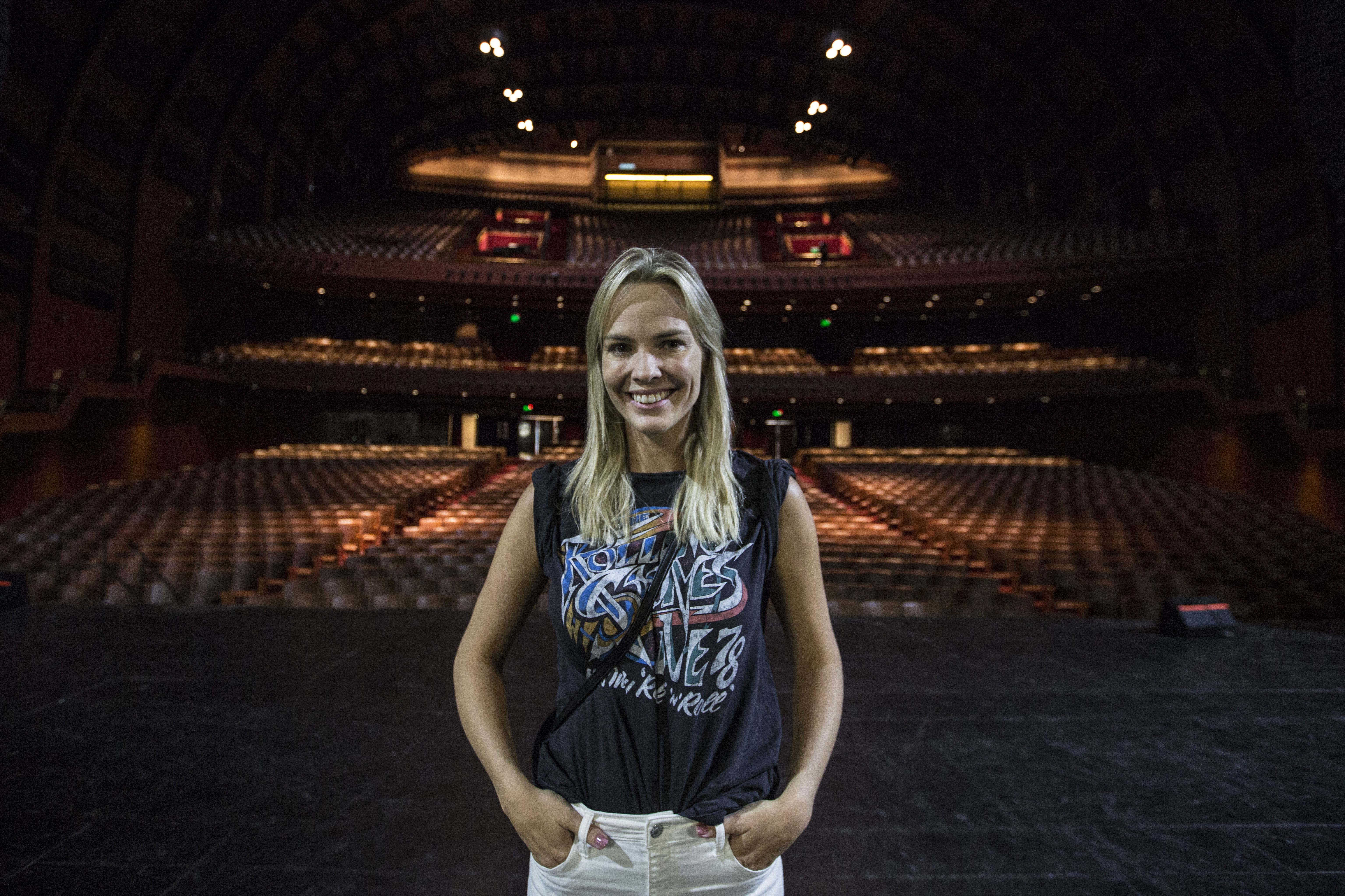 Buenos Aires, 16 de marzo de 2017 - Entrevista a Muni Seligmann en el teatro Gran Rex.